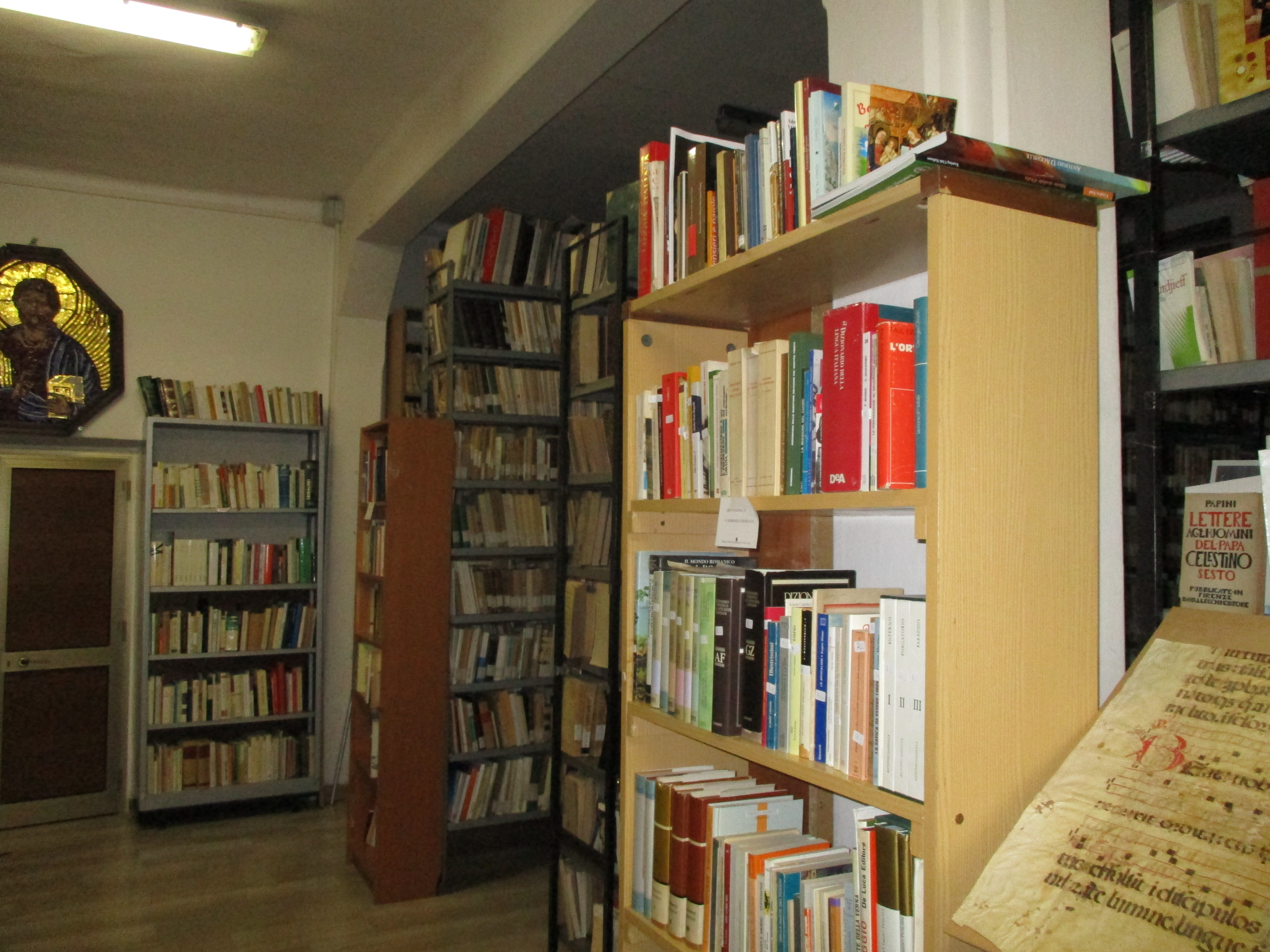 Interno della biblioteca